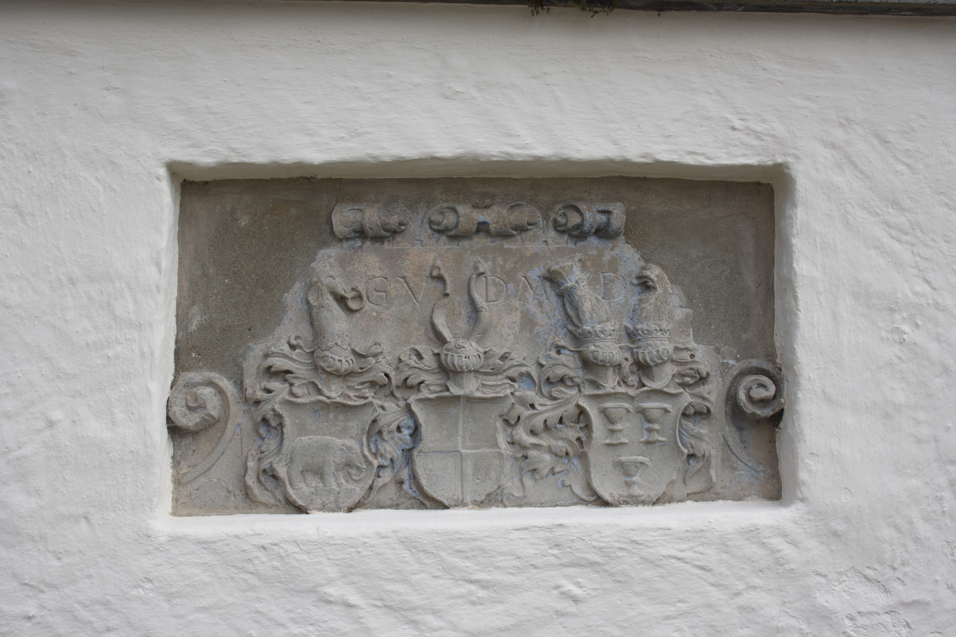 ehemaliges katholisches Pfarrhaus in Bissingen im Landkreis Dillingen an der Donau (Bayern), 1684 erbaut von Georg Danner, Wappen von Konrad von Bemelberg, Katharina von Helfenstein und Anna Maria von Stauffen.